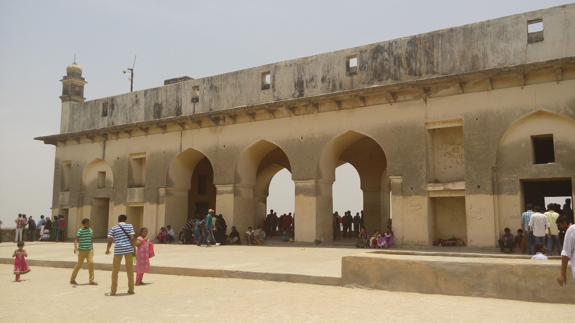 The Baradari.jpg